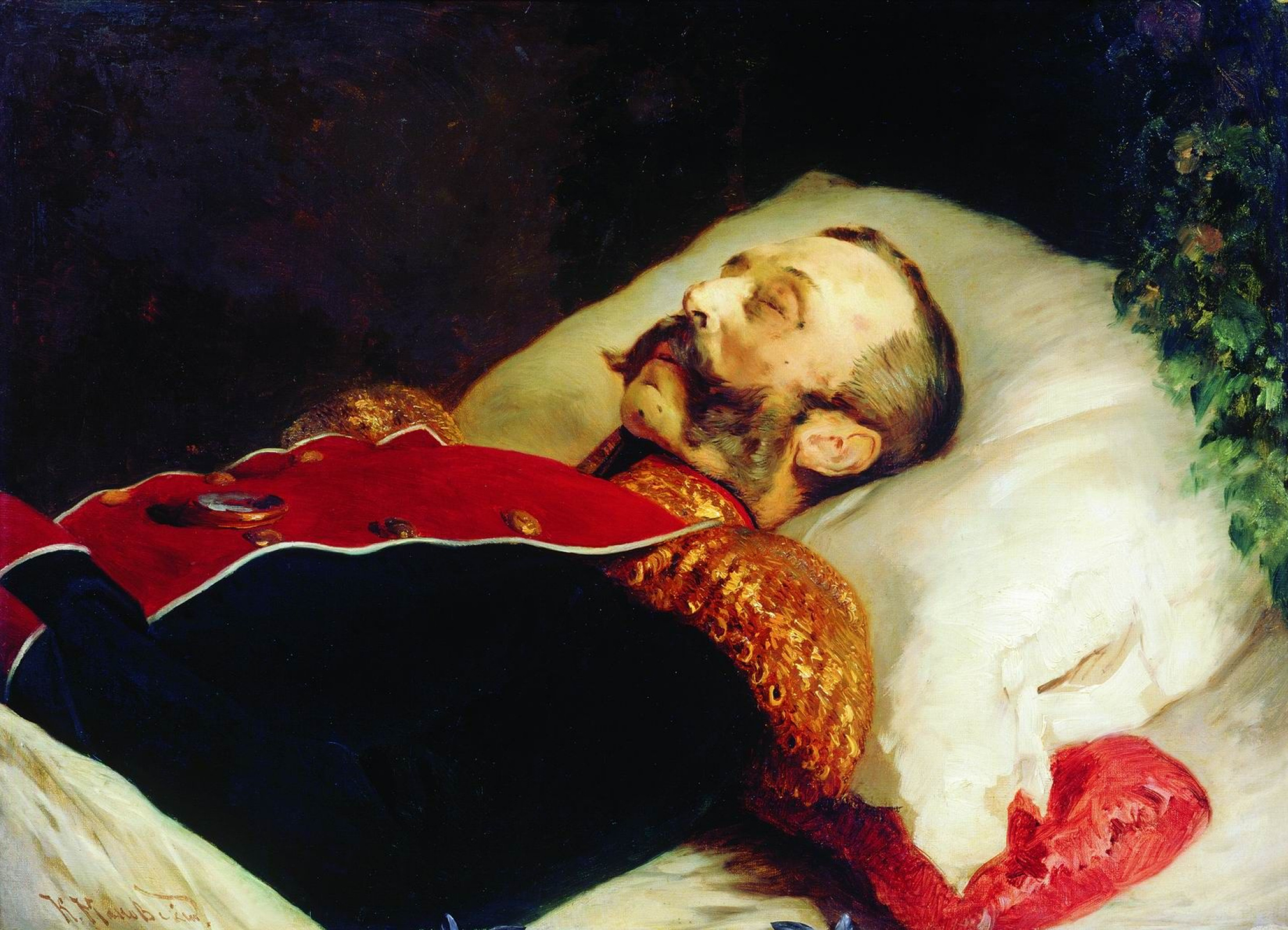 Константин Егорович Маковский (1839-1915) «Портрет Александра II на смертном одре»